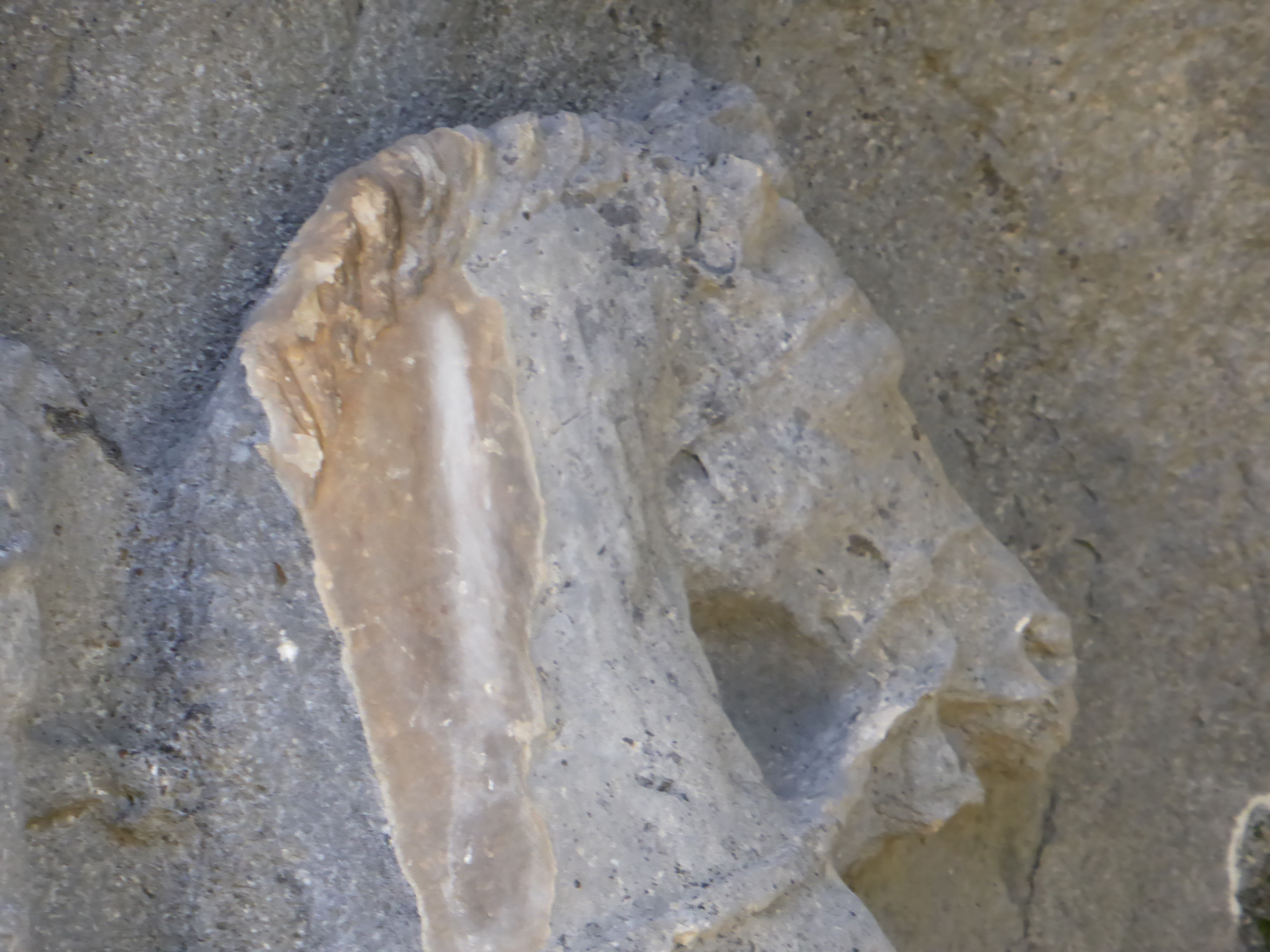 Alketasgrab, Termessos